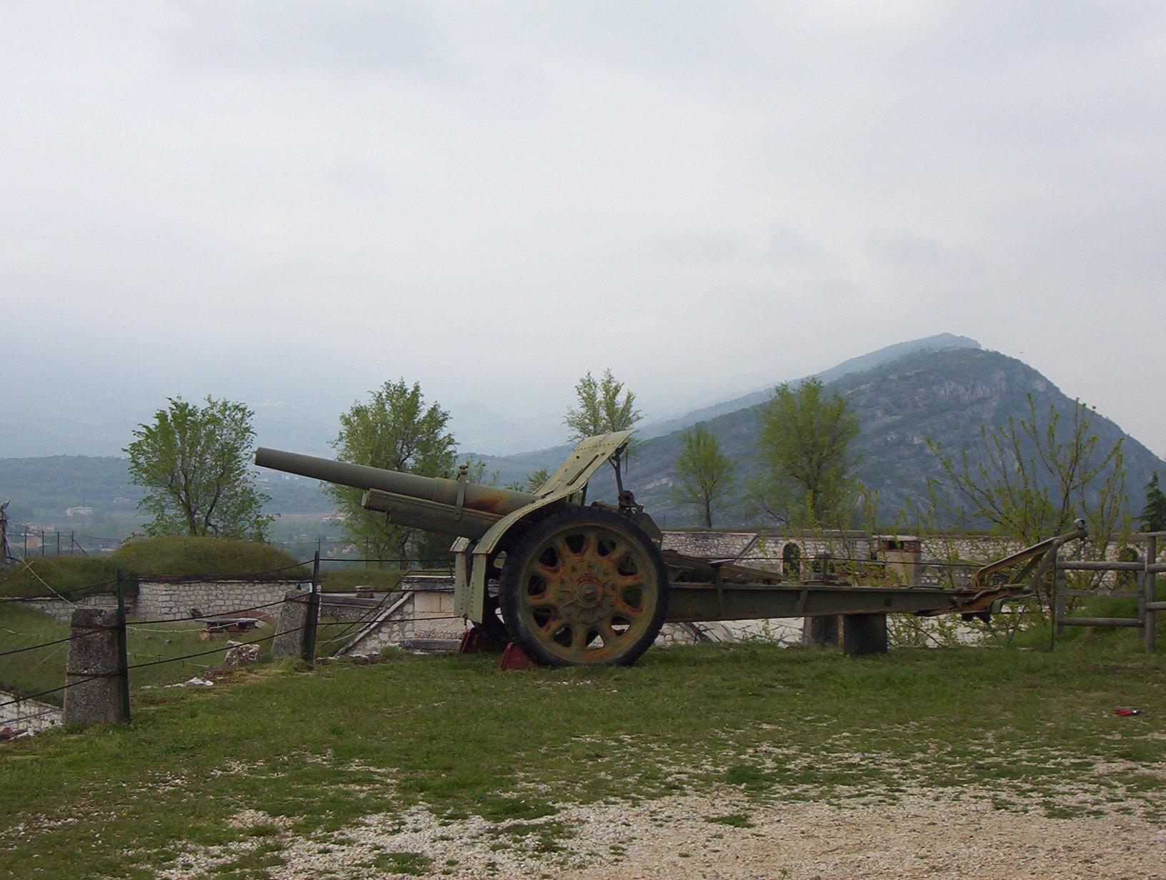 Forte di Rivoli - Cannone 105/28